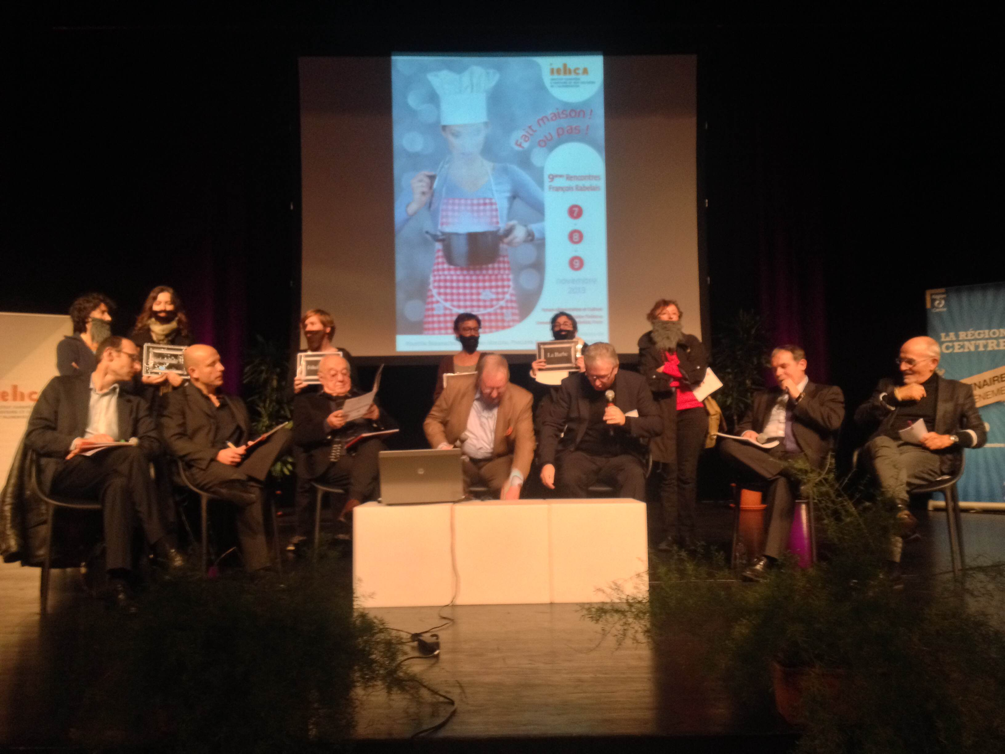 action du groupe d'action féministe La Barbe, université de la gastronomie à Tours - Rencontres François Rabelais 09 11 2013